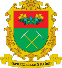 Герб Черняхівського району